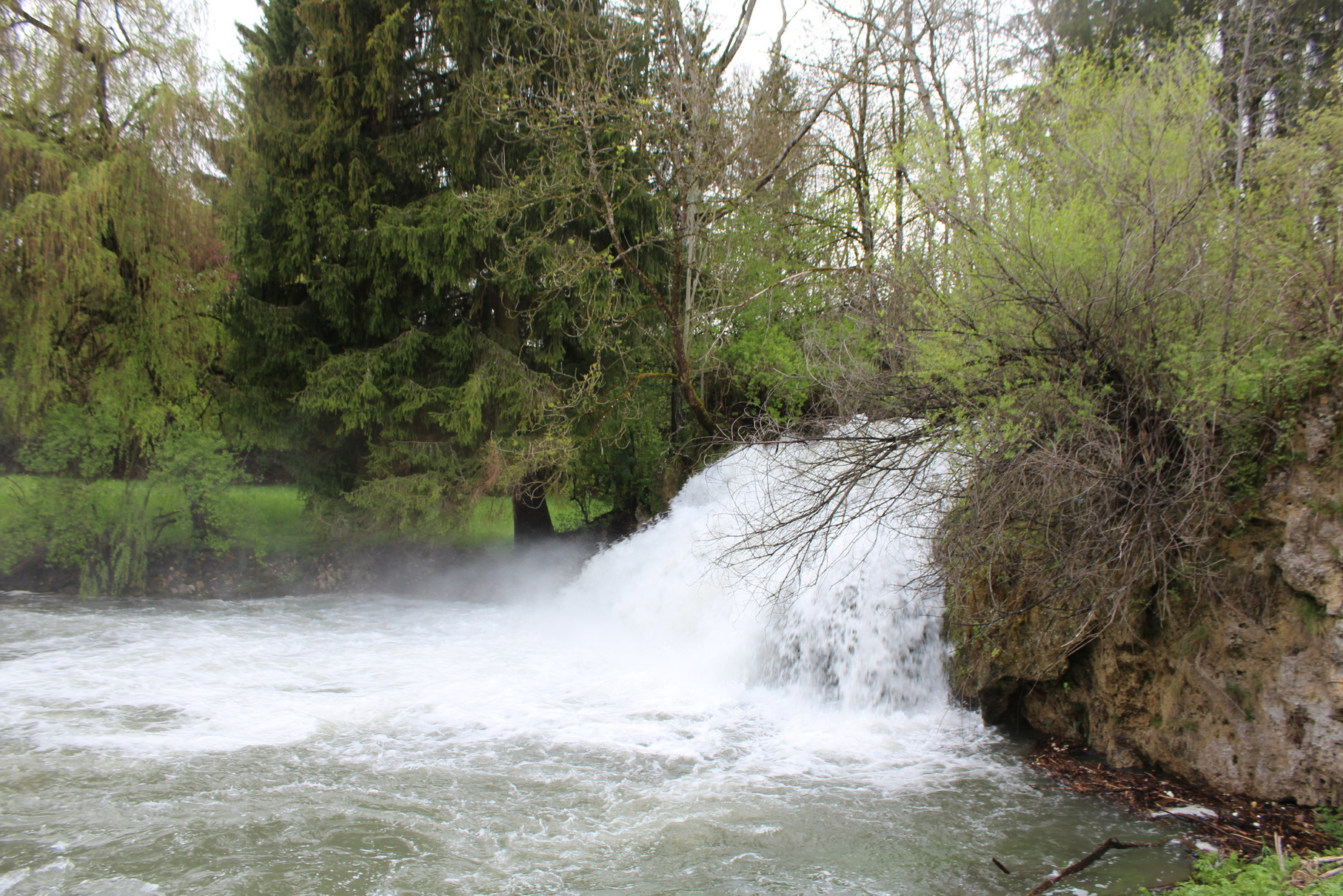 Der Wasserfall Gieß in Veringendorf war, nach der Wassermenge und der Höhe der Kalktuffbarre, der größte Wasserfall der Schwäbischen Alb. Der Wasserfall wurde durch den Bau eines E-Werks in den 1920er Jahren erheblich beeinflusst. Das Bild zeigt den Wasserfall bei geöffnetem Wehr während eines Hochwassers am 3. Mai 2015.